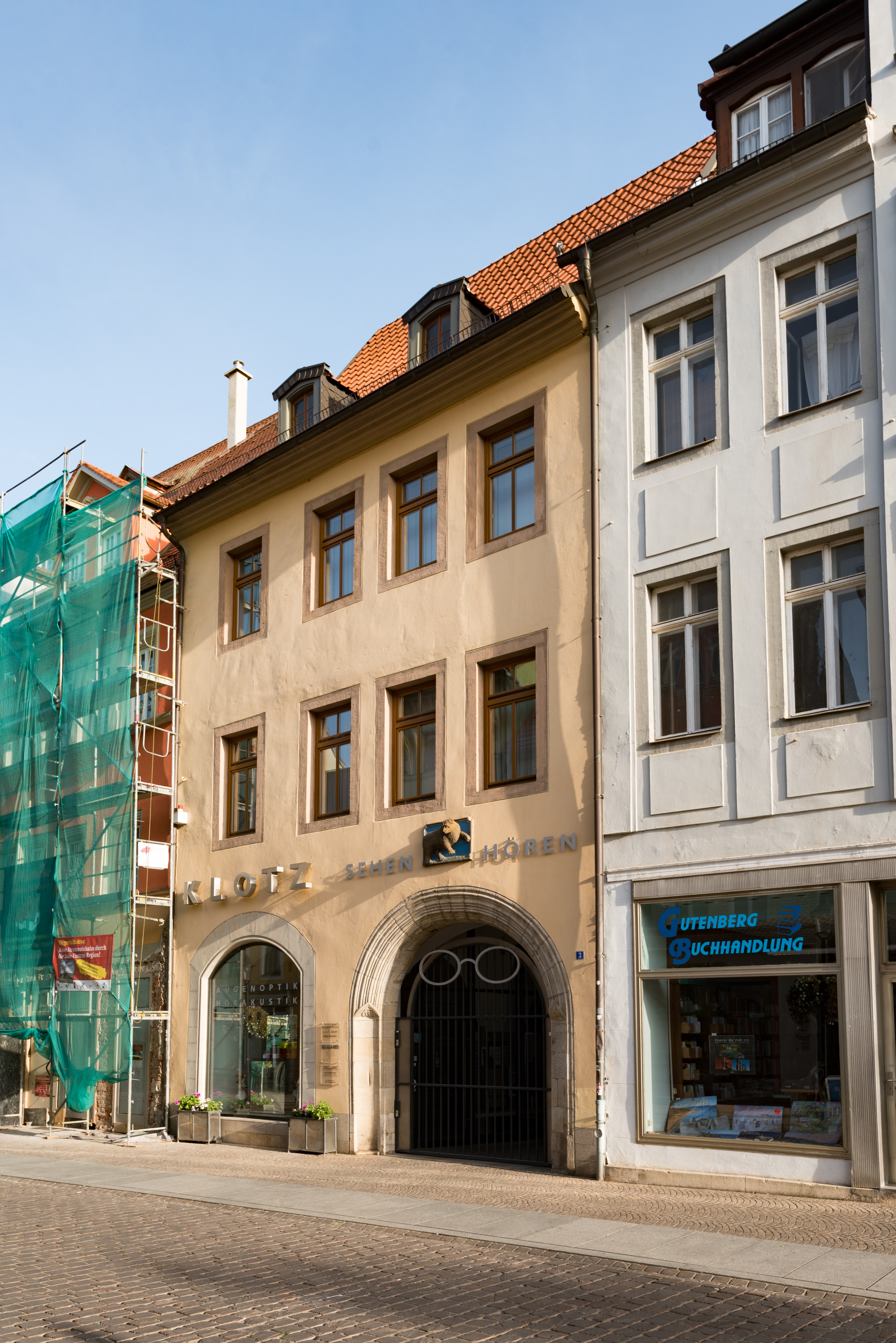 Naumburg (Saale), Jakobstraße 3